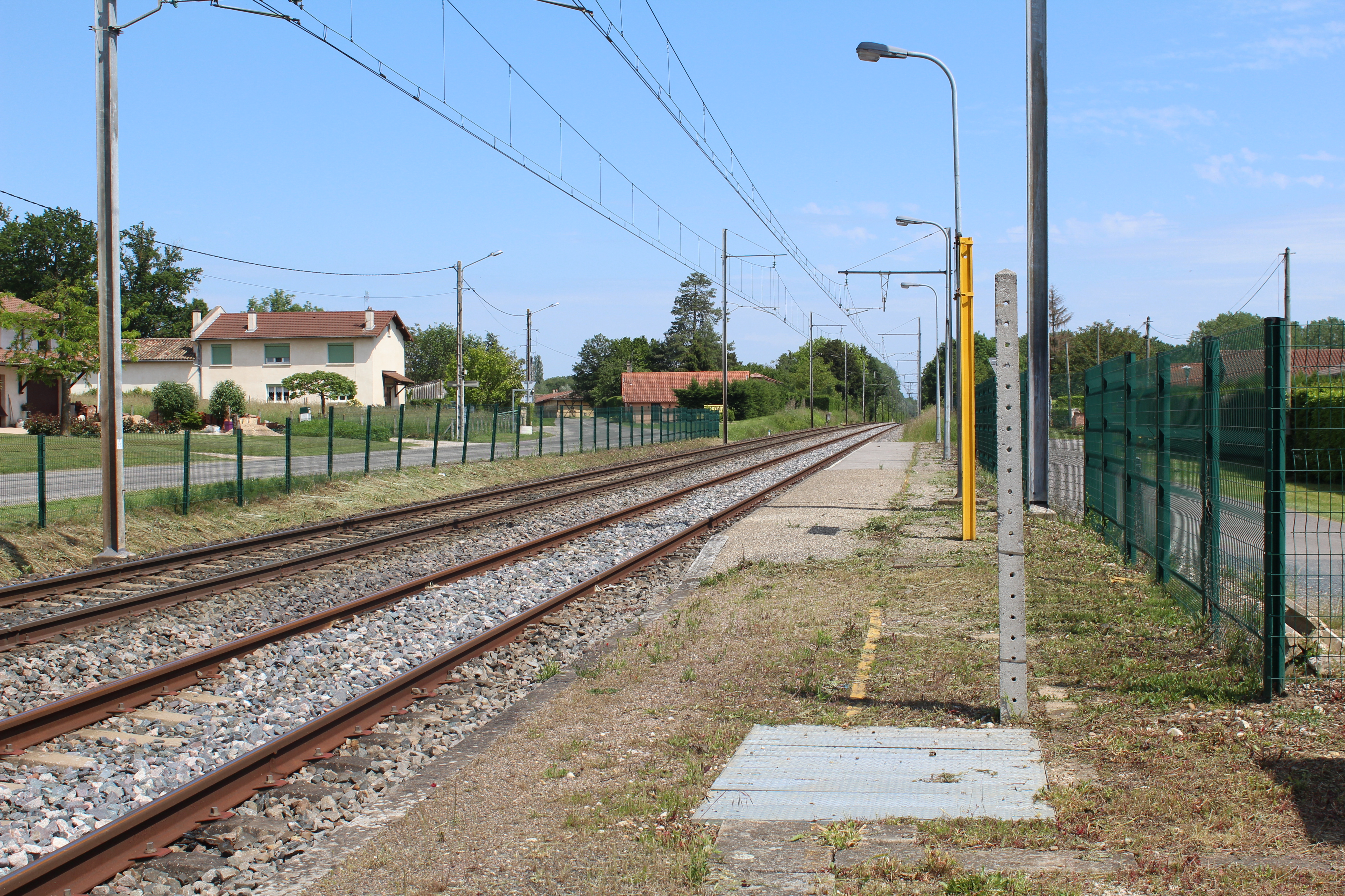 Voie ferroviaire près de la gare de Saint-Jean-sur-Veyle sur la ligne Ambérieu - Mâcon.